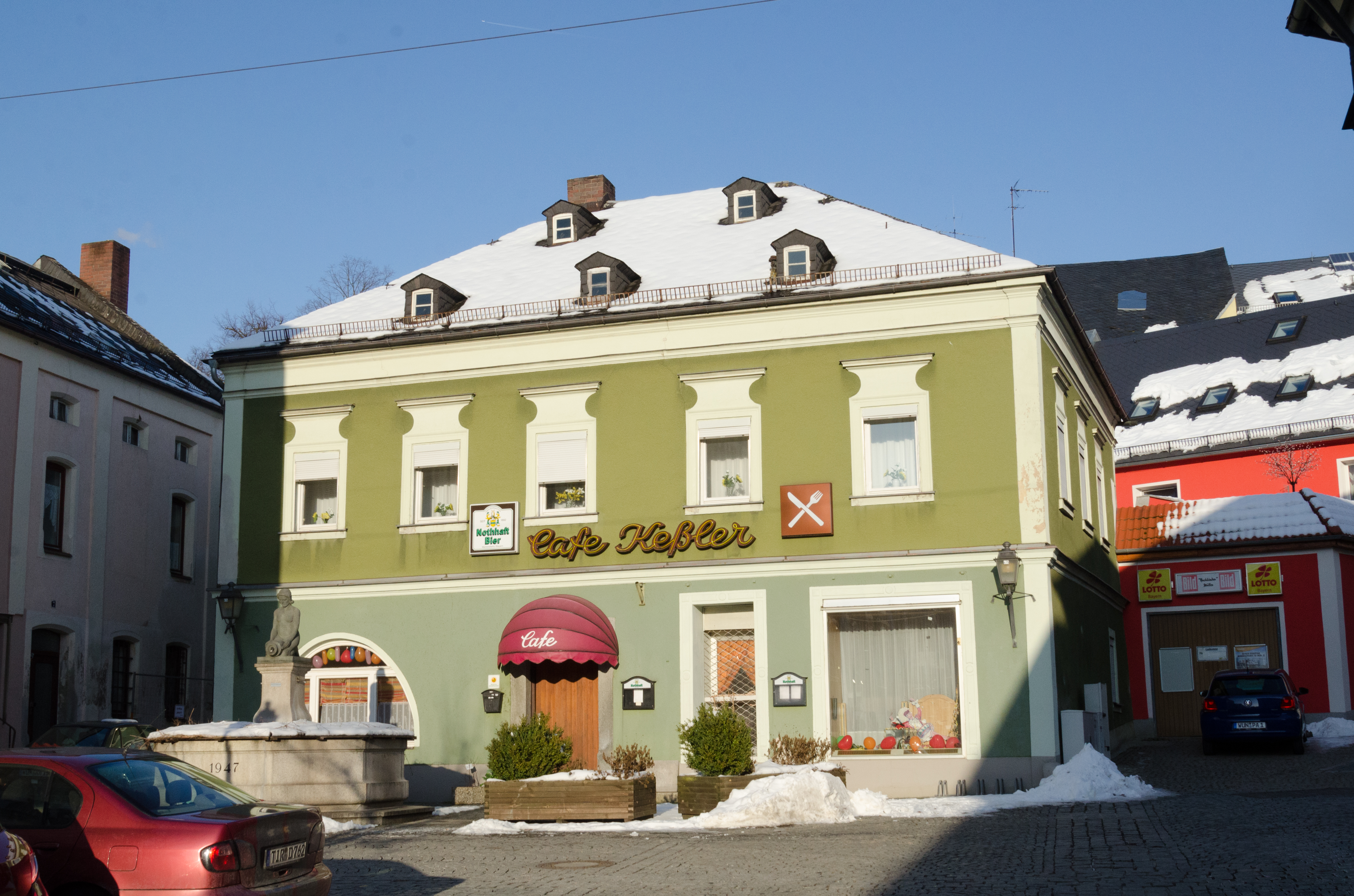 Arzberg, Marktplatz 9,002